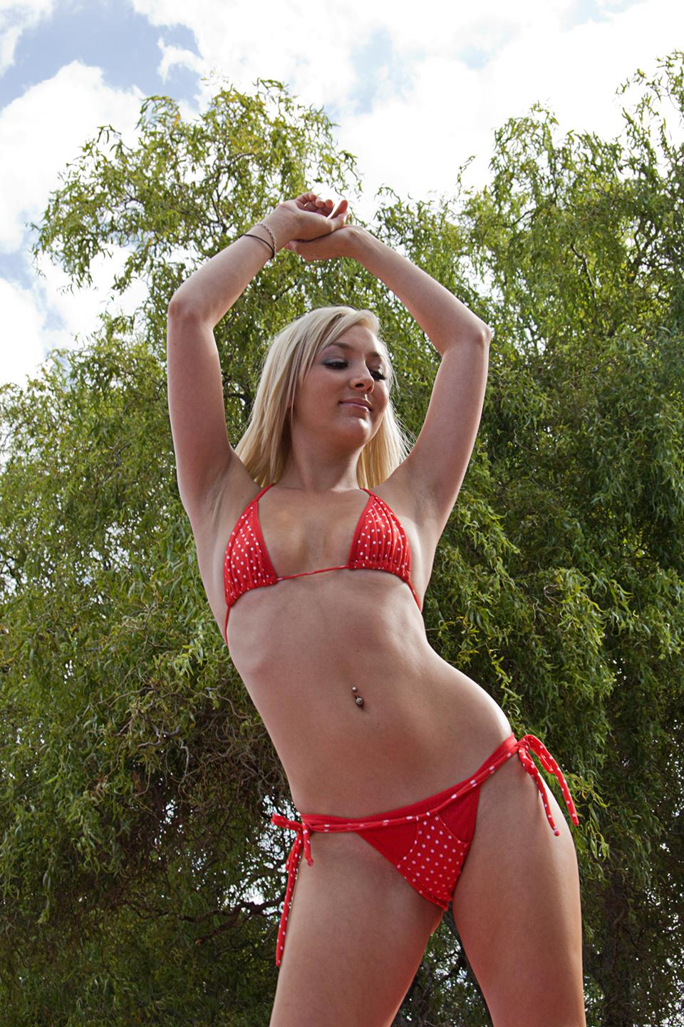 Blonde in red bikini